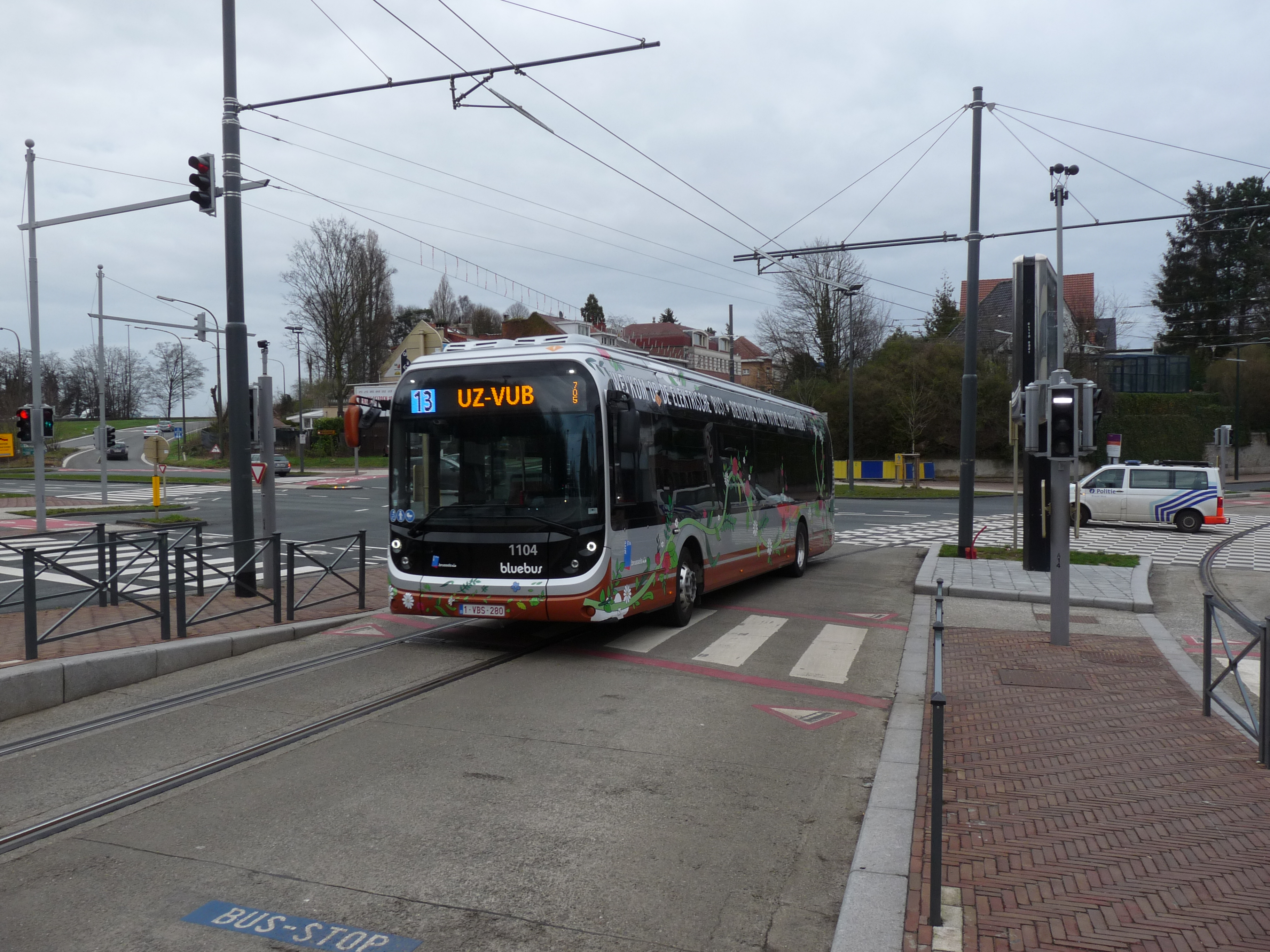 Elektrische Bluebus op lijn 13 in Brussel bij de Dikke Beuk halte